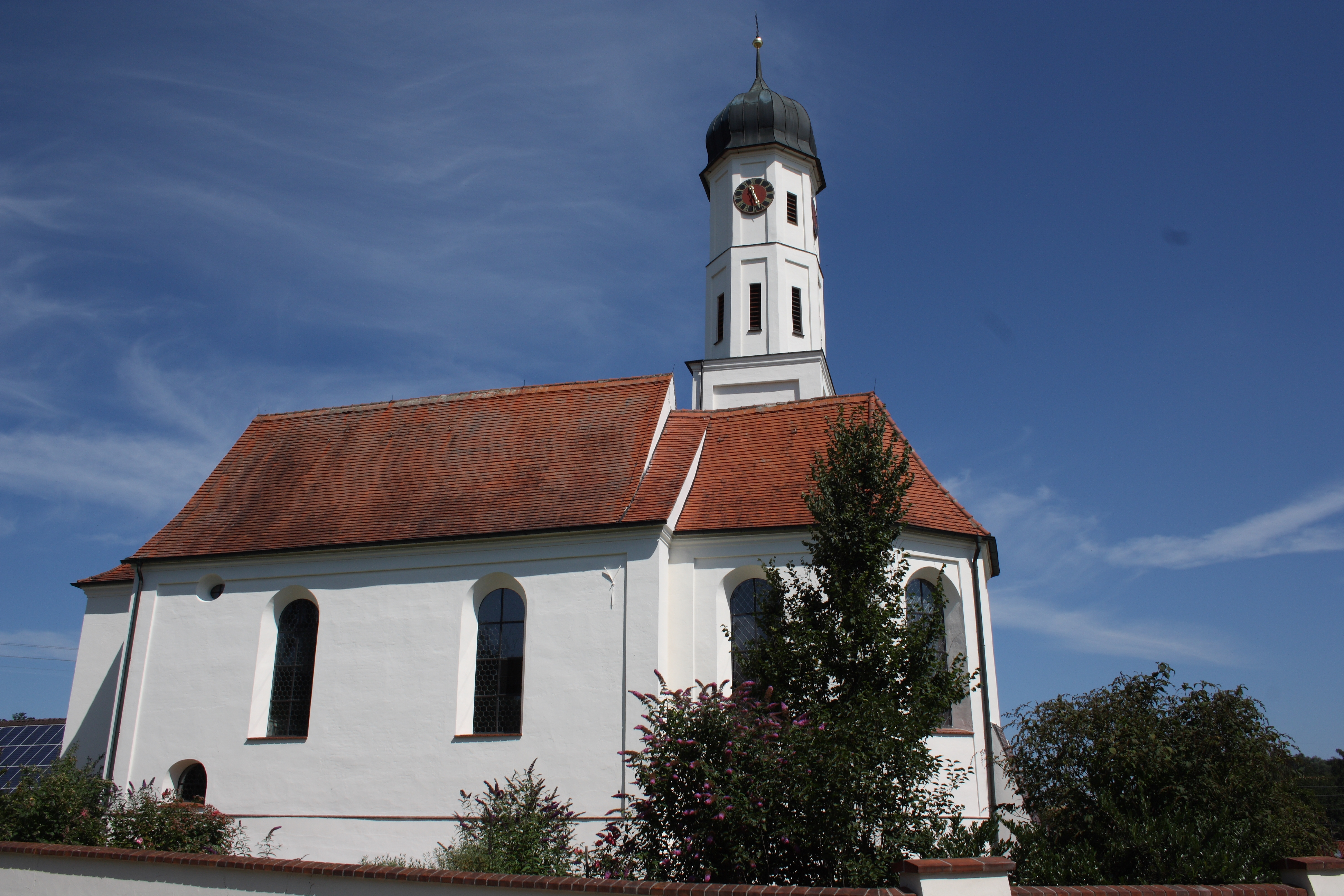 Katholische Pfarrkirche St. Michael in Wengen, einem Ortsteil von Villenbach im Landkreis Dillingen an der Donau (Bayern)